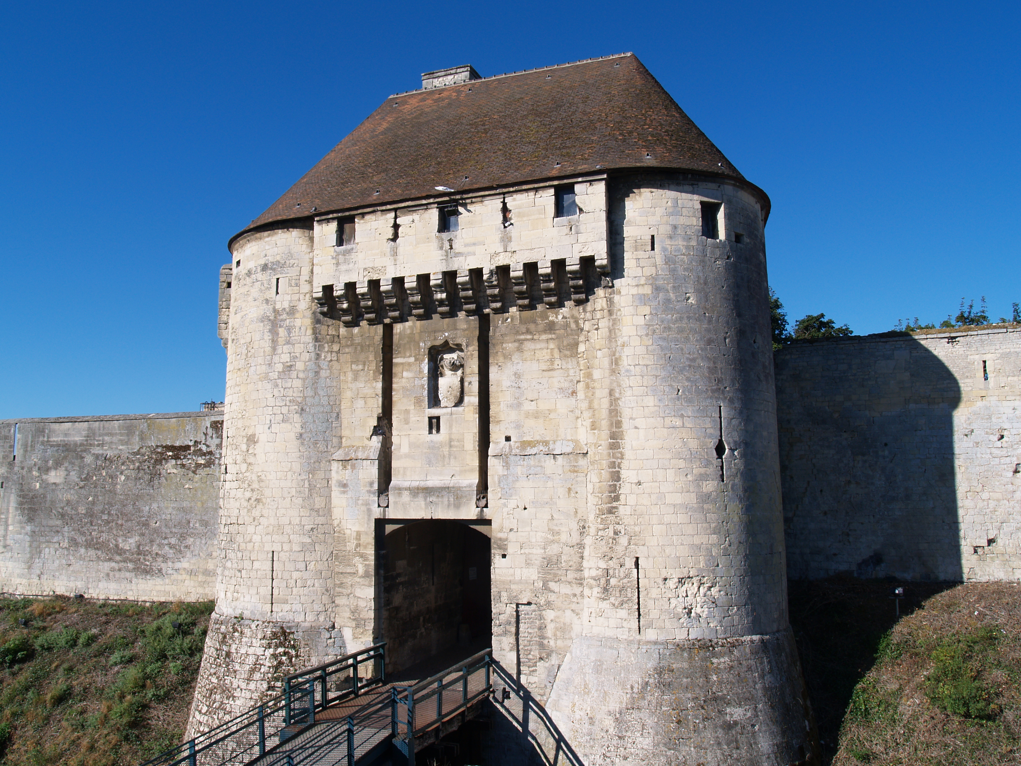 porte des Champs du château de Caen (Calvados, Basse-Normandie).